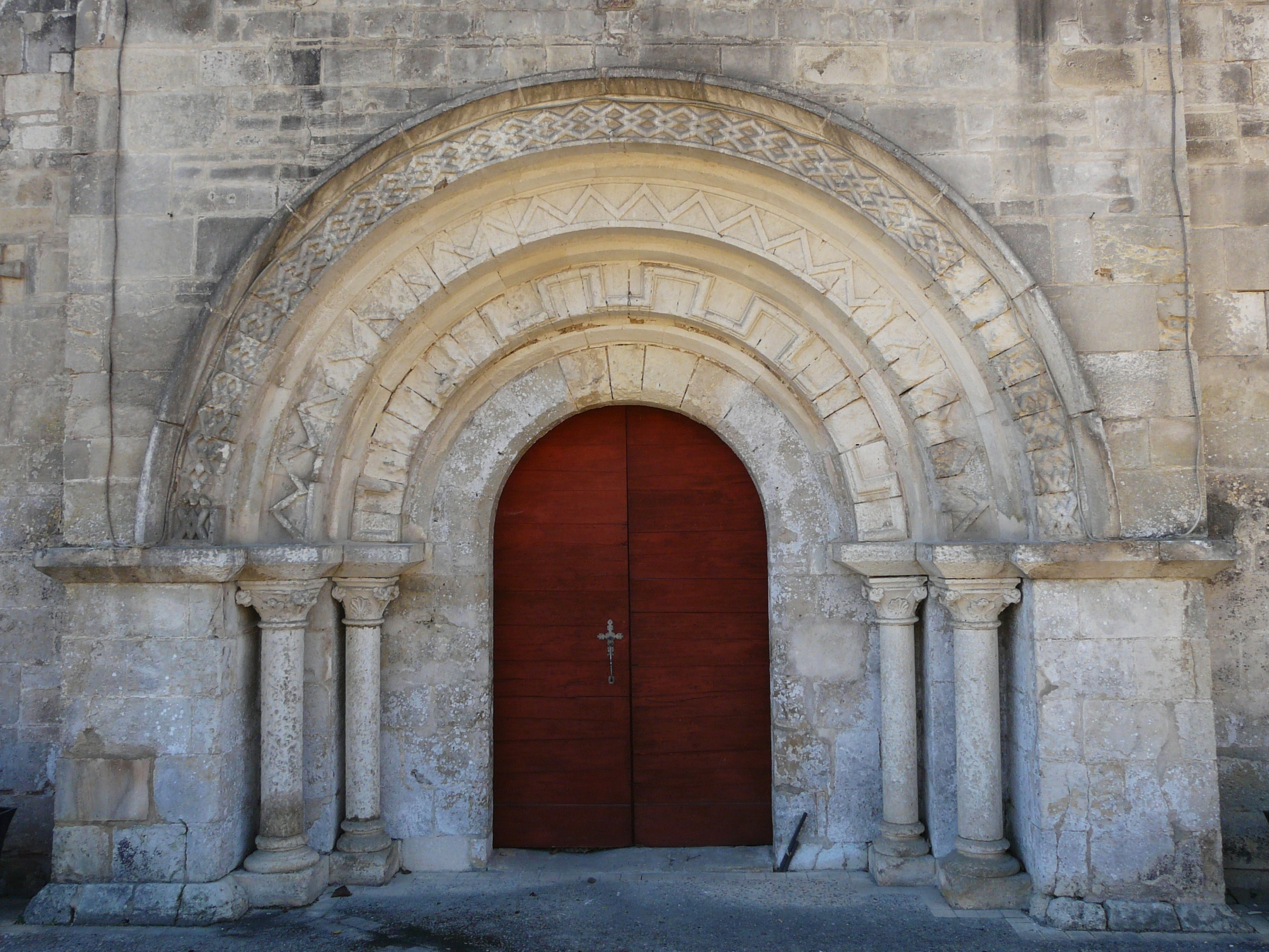 Le portail de l'église Saint-Pierre-ès-Liens, Manzac-sur-Vern, Dordogne, France.